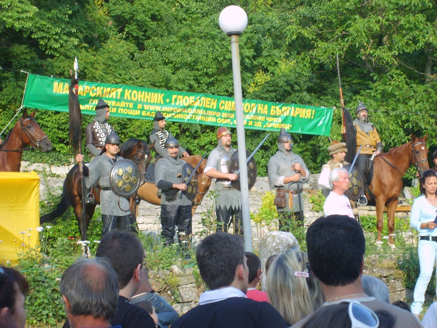 На 29.VІ.2008 г. Мадарският конник бе официално избран за "глобален символ на България".